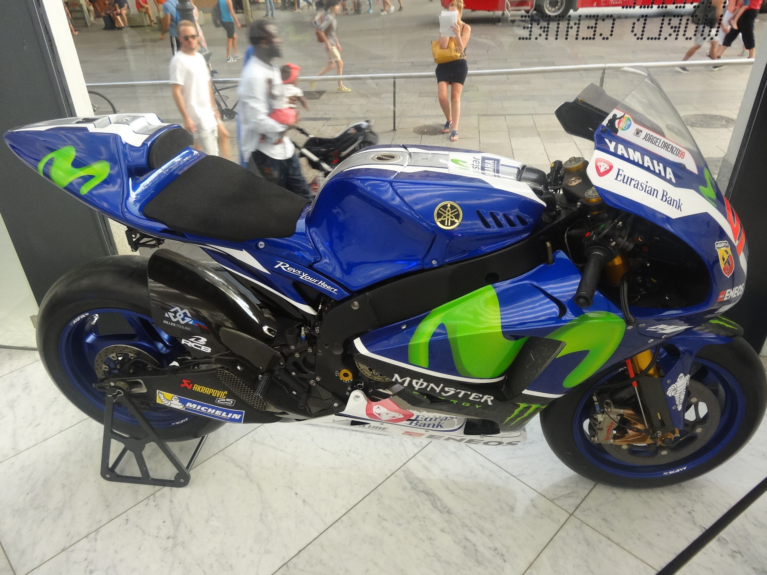 Mobile World Centre, Barcelona. Planta baixa. Moto 2016 del Jorge Lorenzo